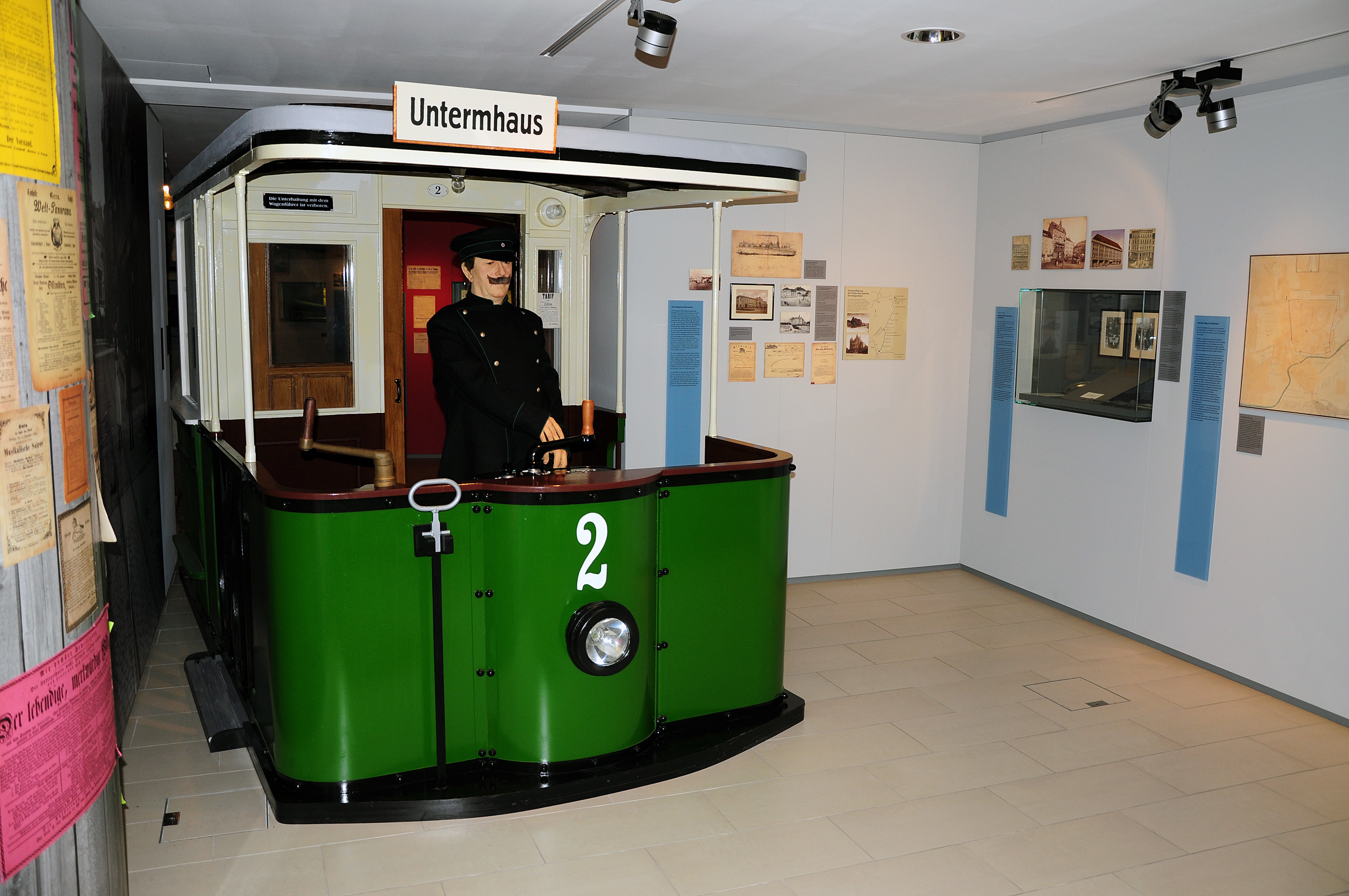 Blick in die Ausstellung im Stadtmuseum Gera, 2009